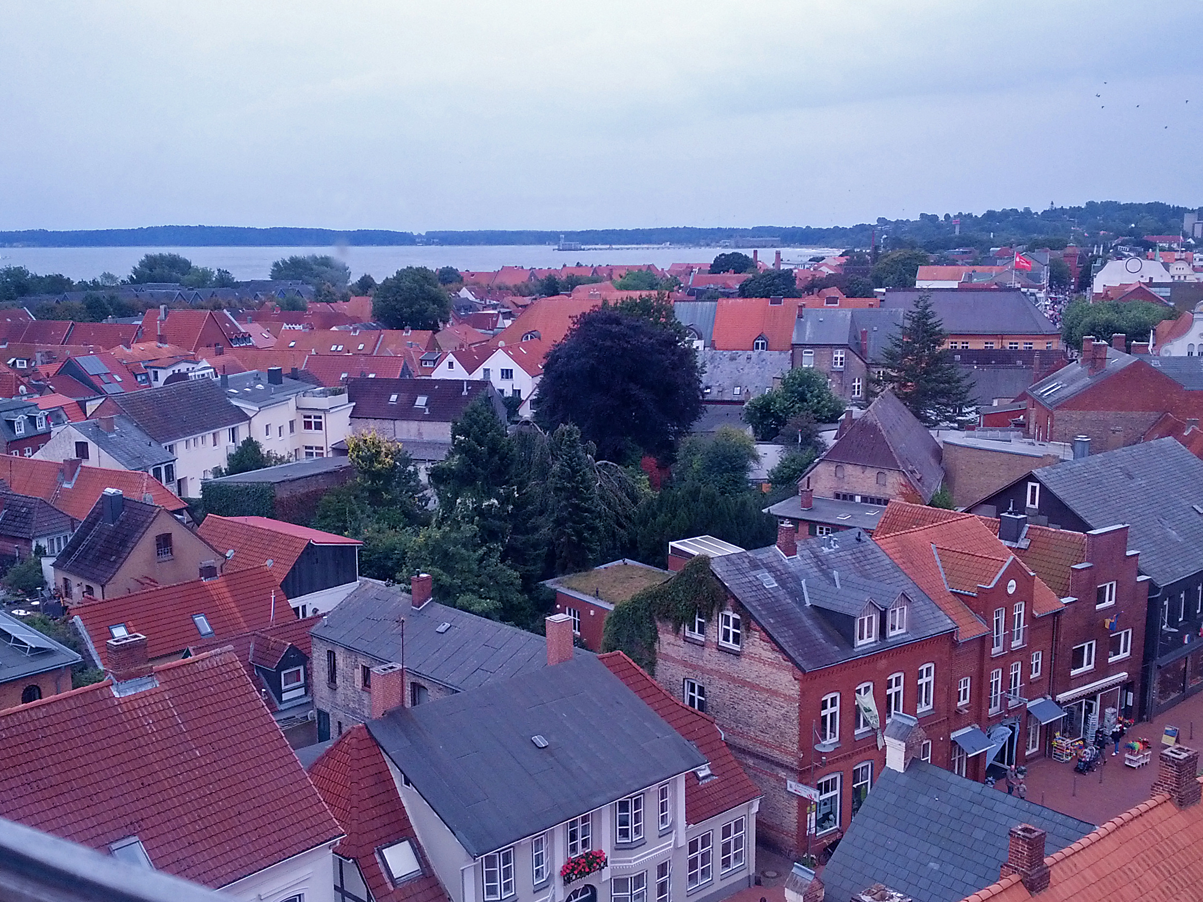 Blick in Richtung Süden vom Eckernförder Rundsilo über die Altstadt.